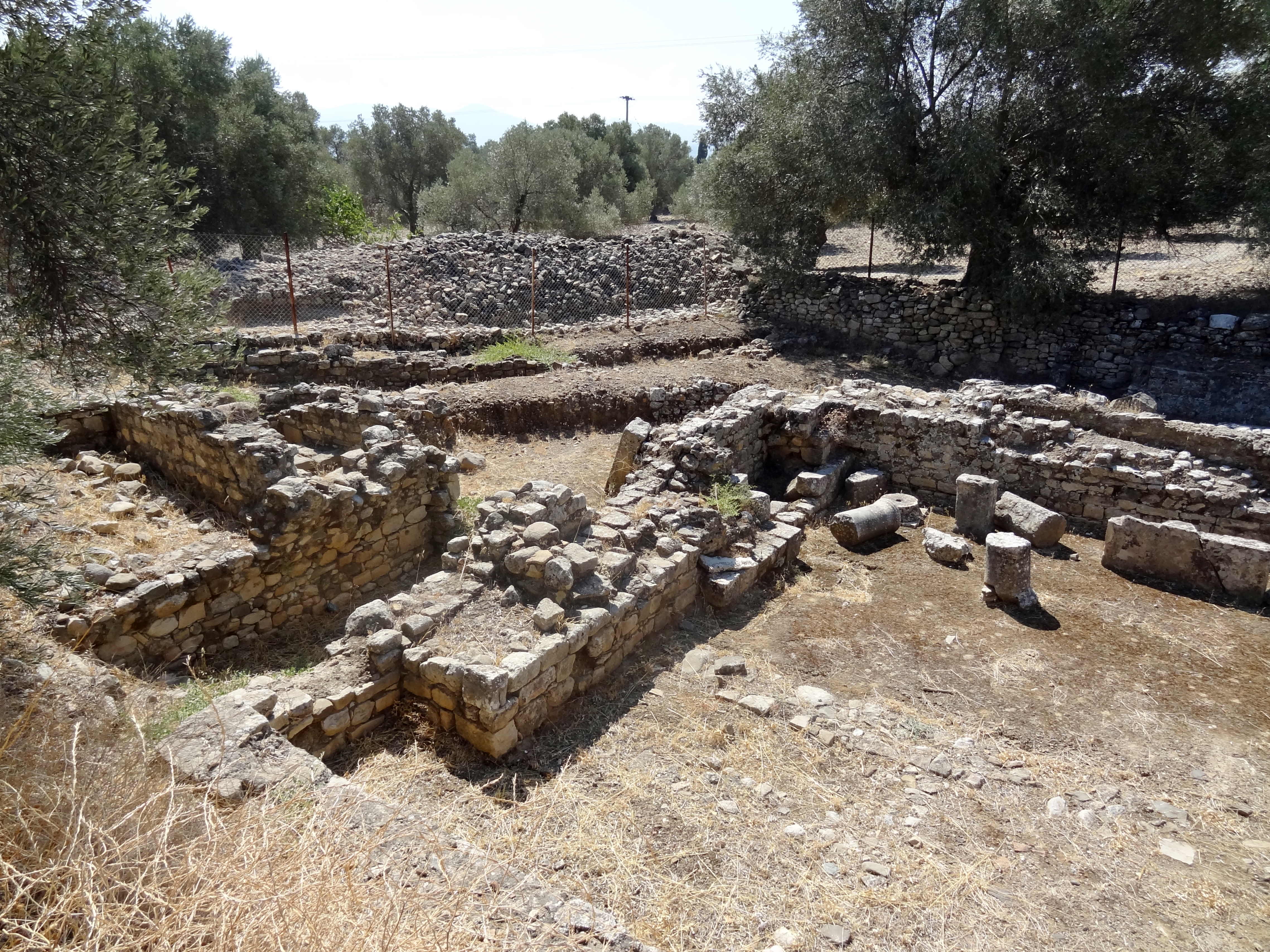 Reste der griechisch-römischen Stadt Gortyn (Γορτύν), Gemeinde Gortyna, Regionalbezirk Iraklio, Kreta, Griechenland